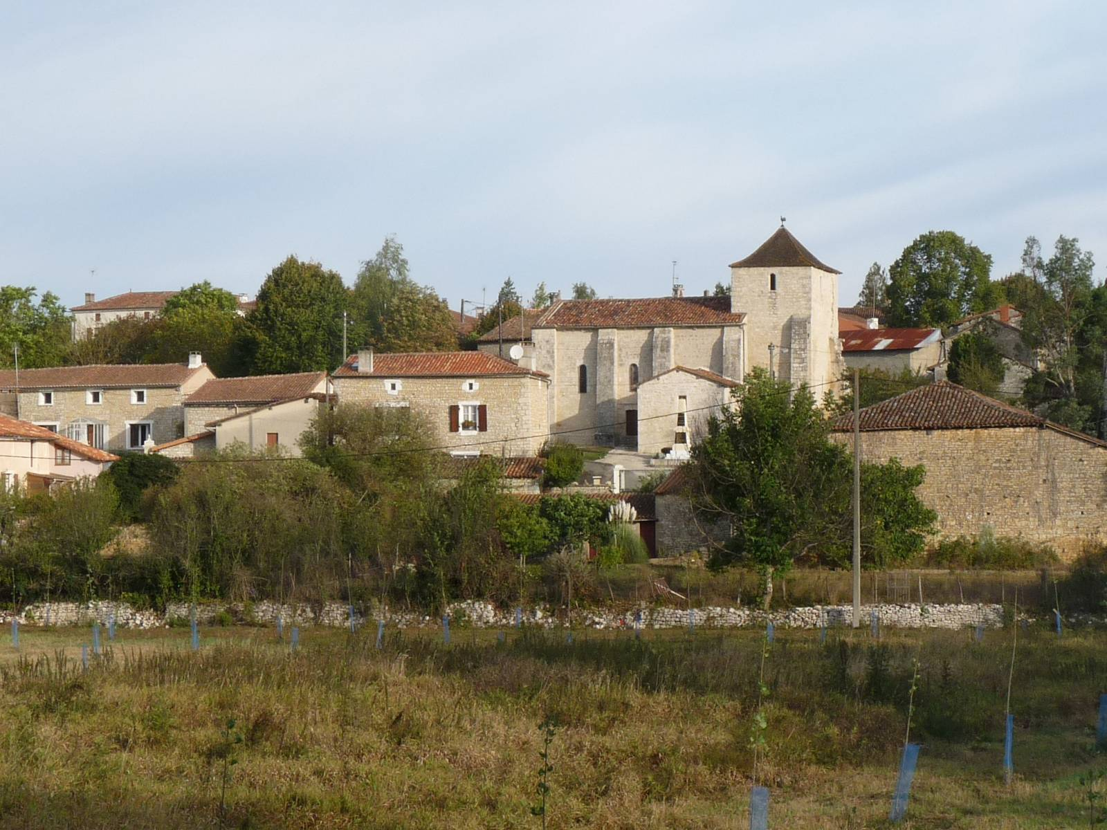 vue de Valence, Charente, France